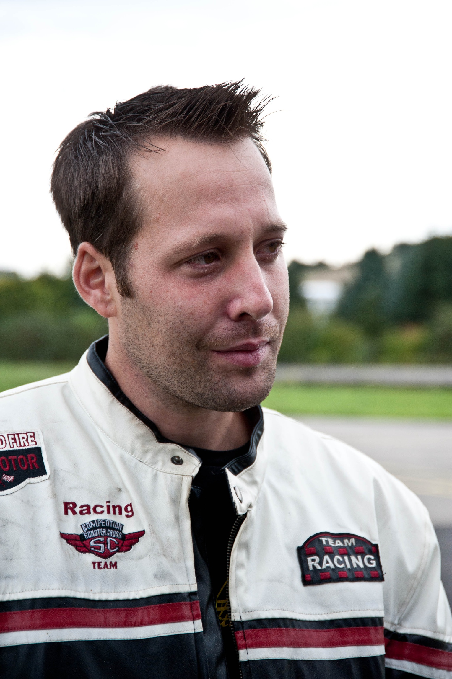 Patrick Doetsch im Jahr 2010